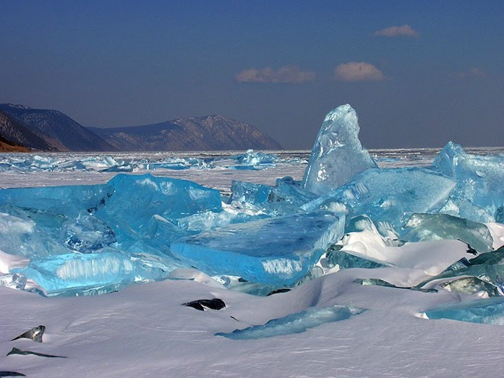 Winter in Baikal Lake